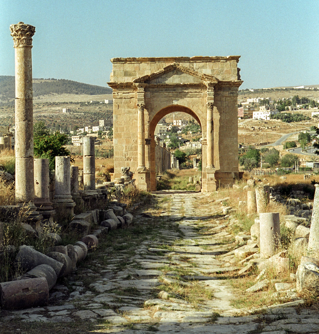 Jerash, Jordan